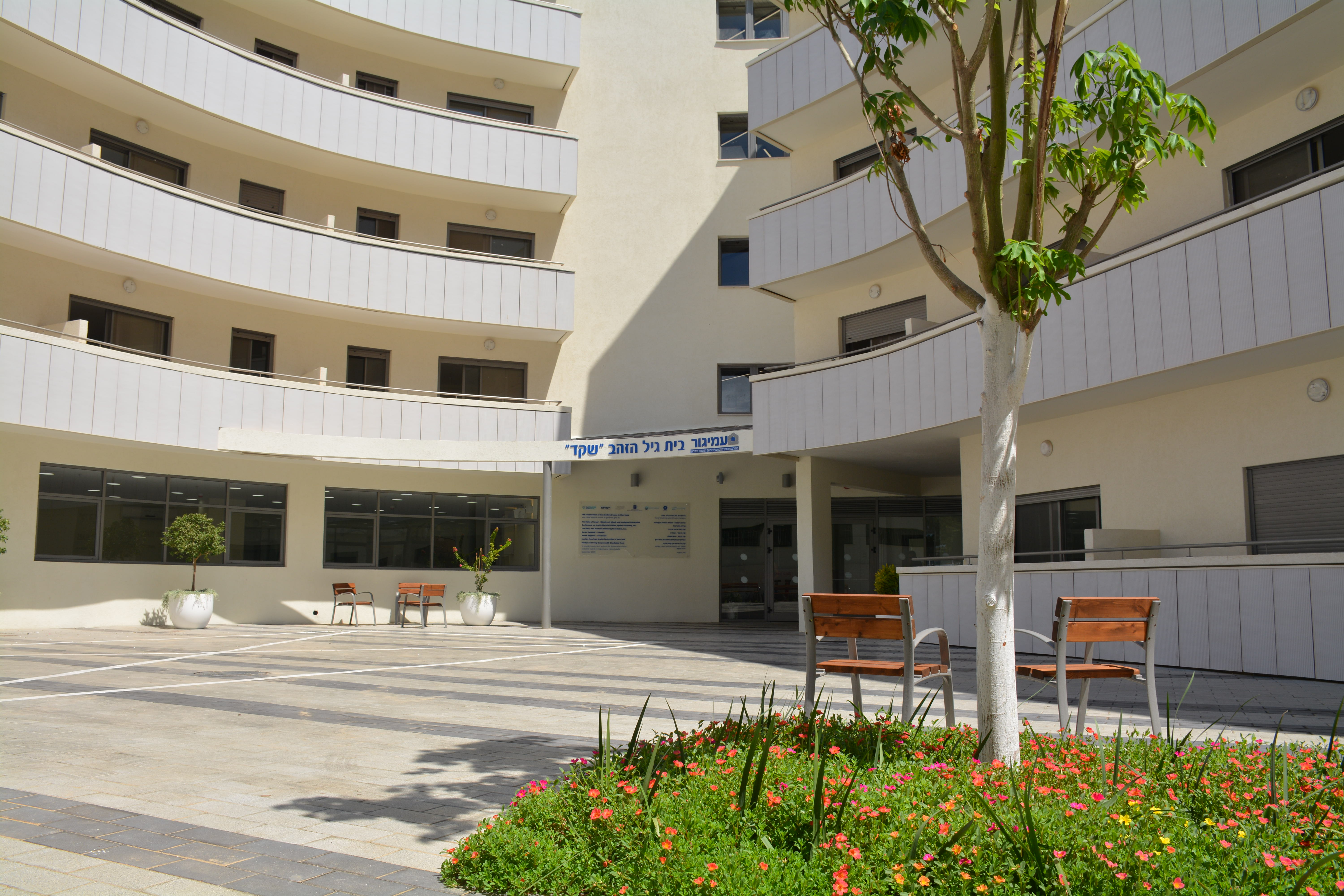 בית גיל הזהב "שקד" בכפר סבא